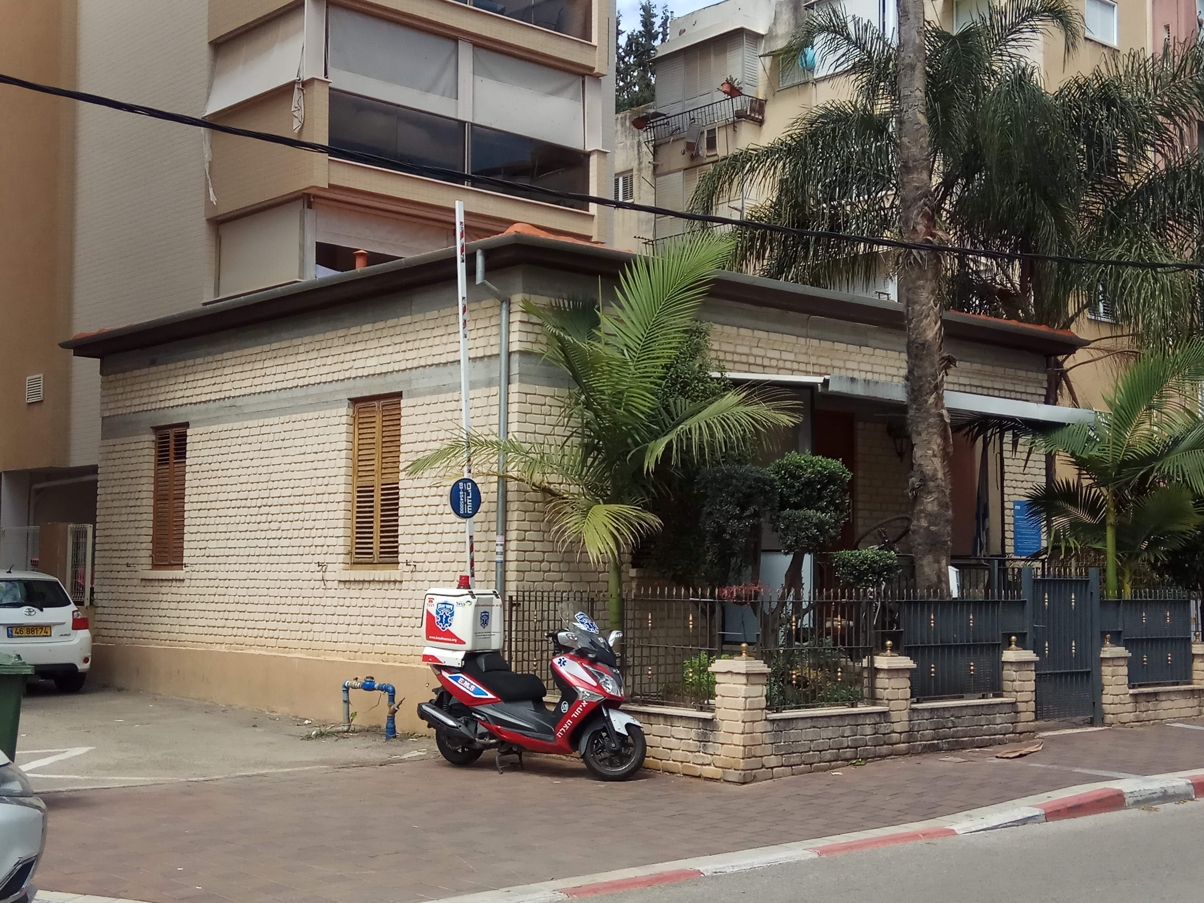 בית ימיני רח' שפירא 10 בפתח תקווה